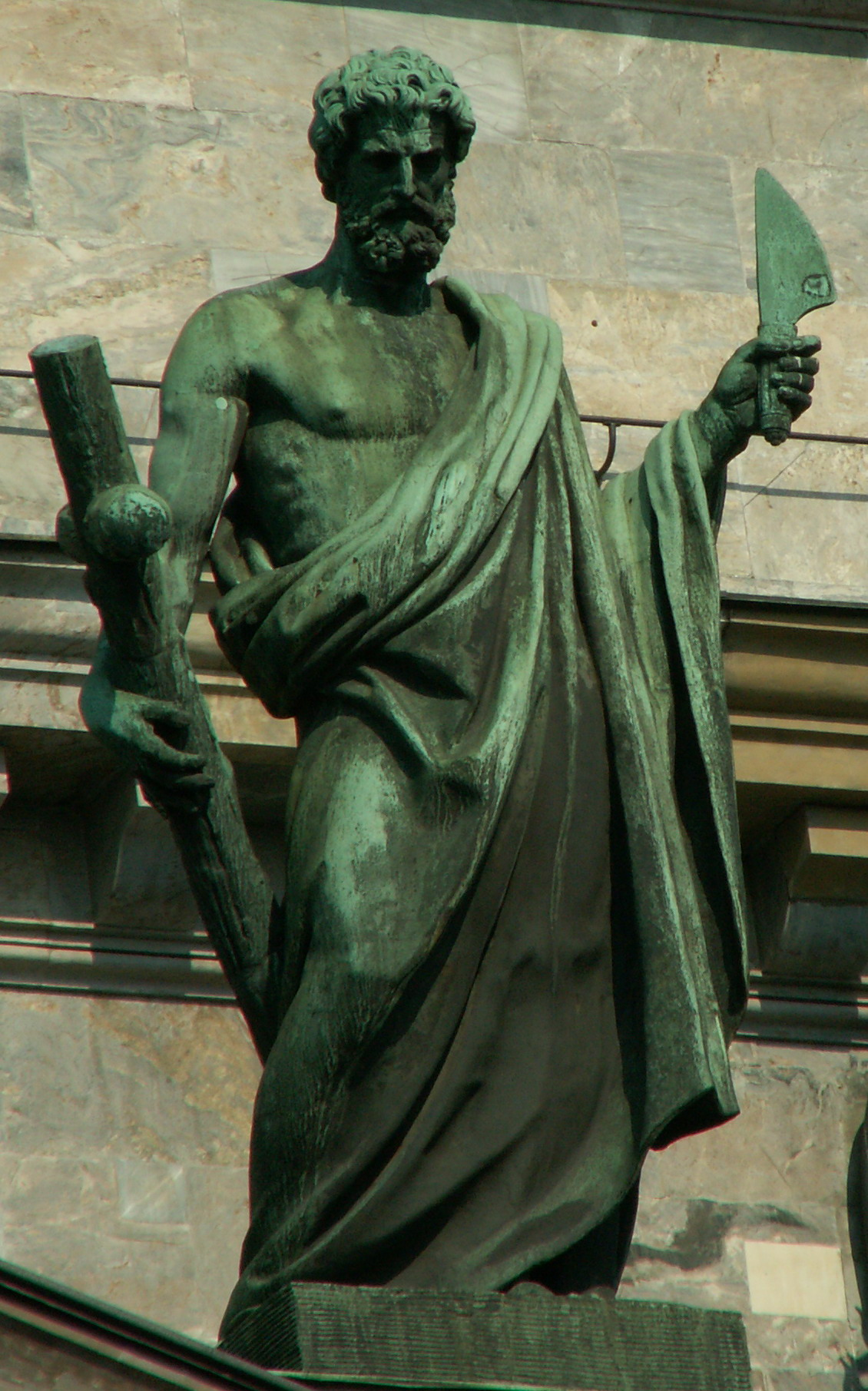 Statue of Apostle Bartholomew on Saint Isaac's cathedral. Saint Petersburg, Russia Статуя Апостола Валфоломея на Исаакиевском соборе. Санкт-Петербург. Россия.